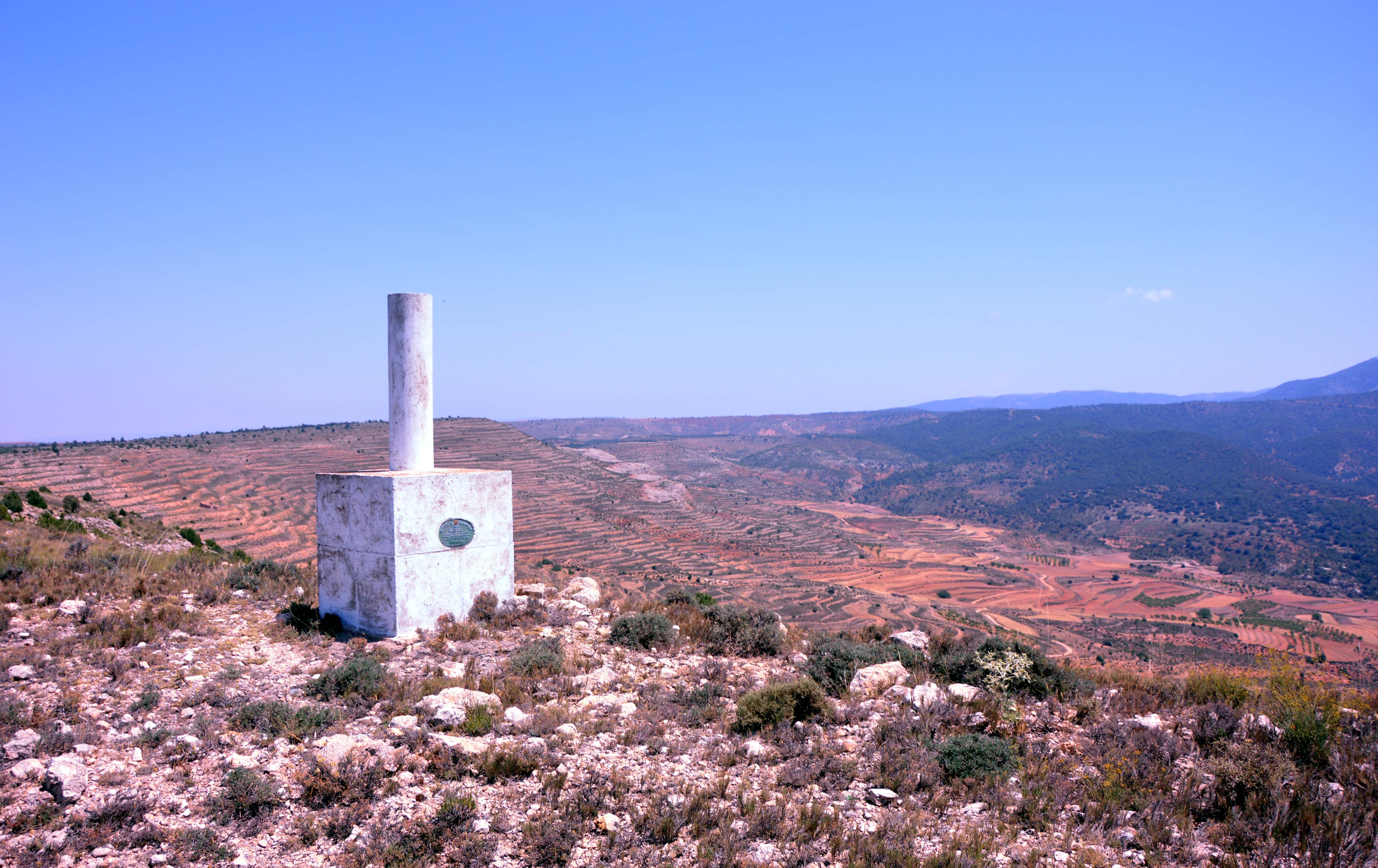 Punto geodésico situado detrás de la Ermita de Santa Bárbara en Riodeva (Teruel), 2017.